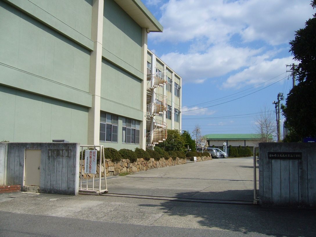 愛知県立名南工業高等学校